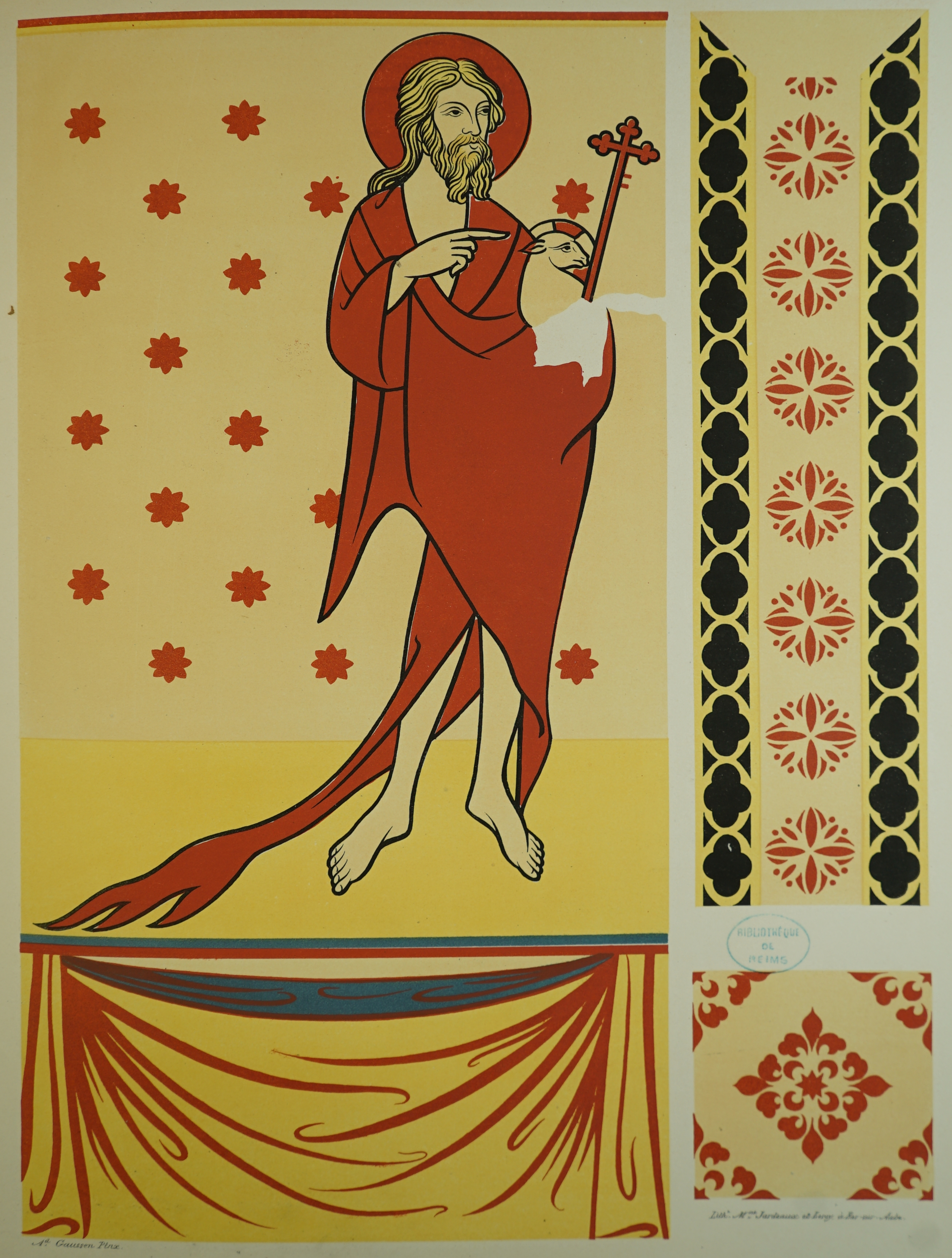 objet du cabinet de l'abbé Coffinet.